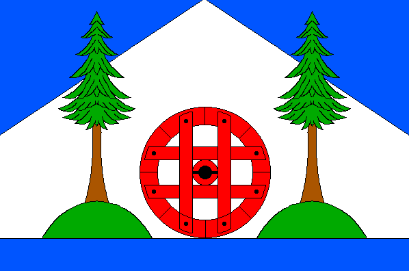 Albrechtice v Jizerských horách - vlajka